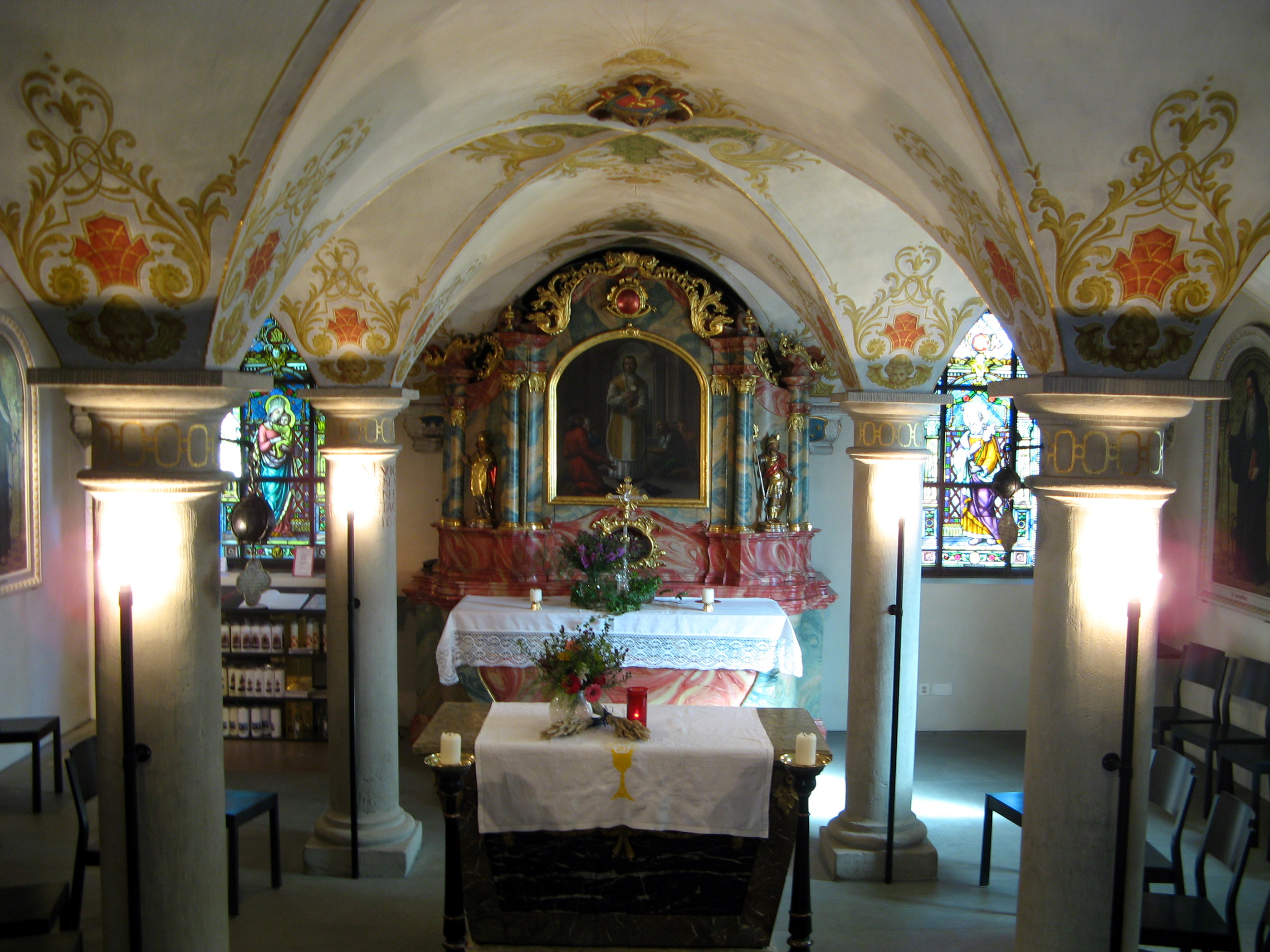 Kirche St. Burkhard in Beinwil (Freiamt), Krypta